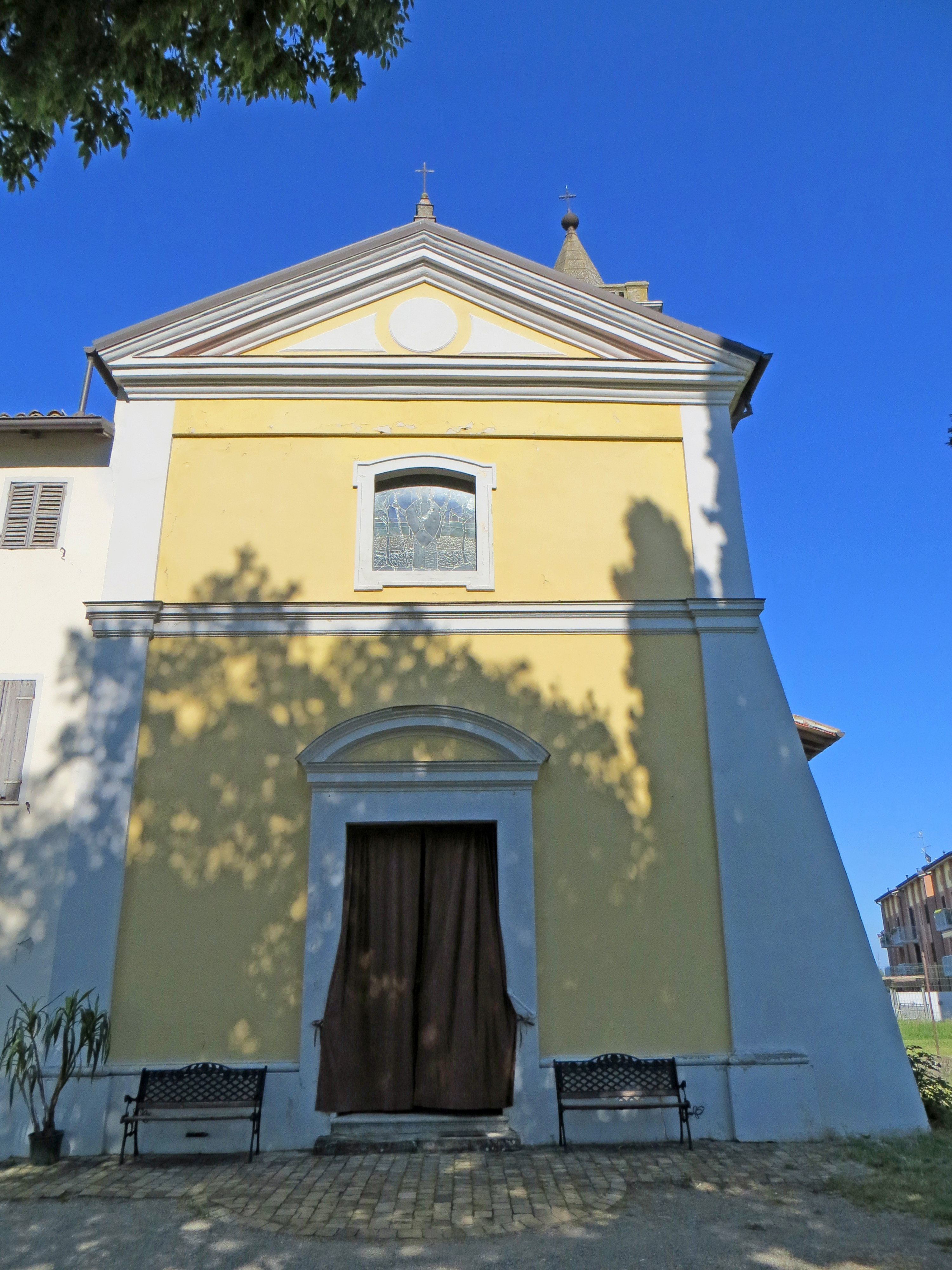 Chiesa di San Ruffino (San Ruffino, Parma) - facciata